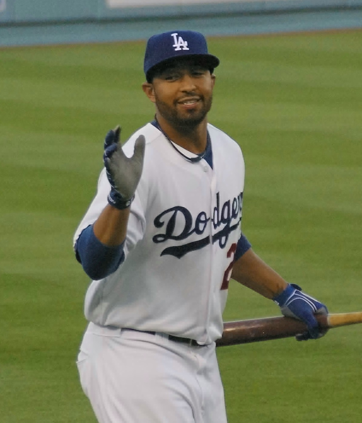 Matt Kemp